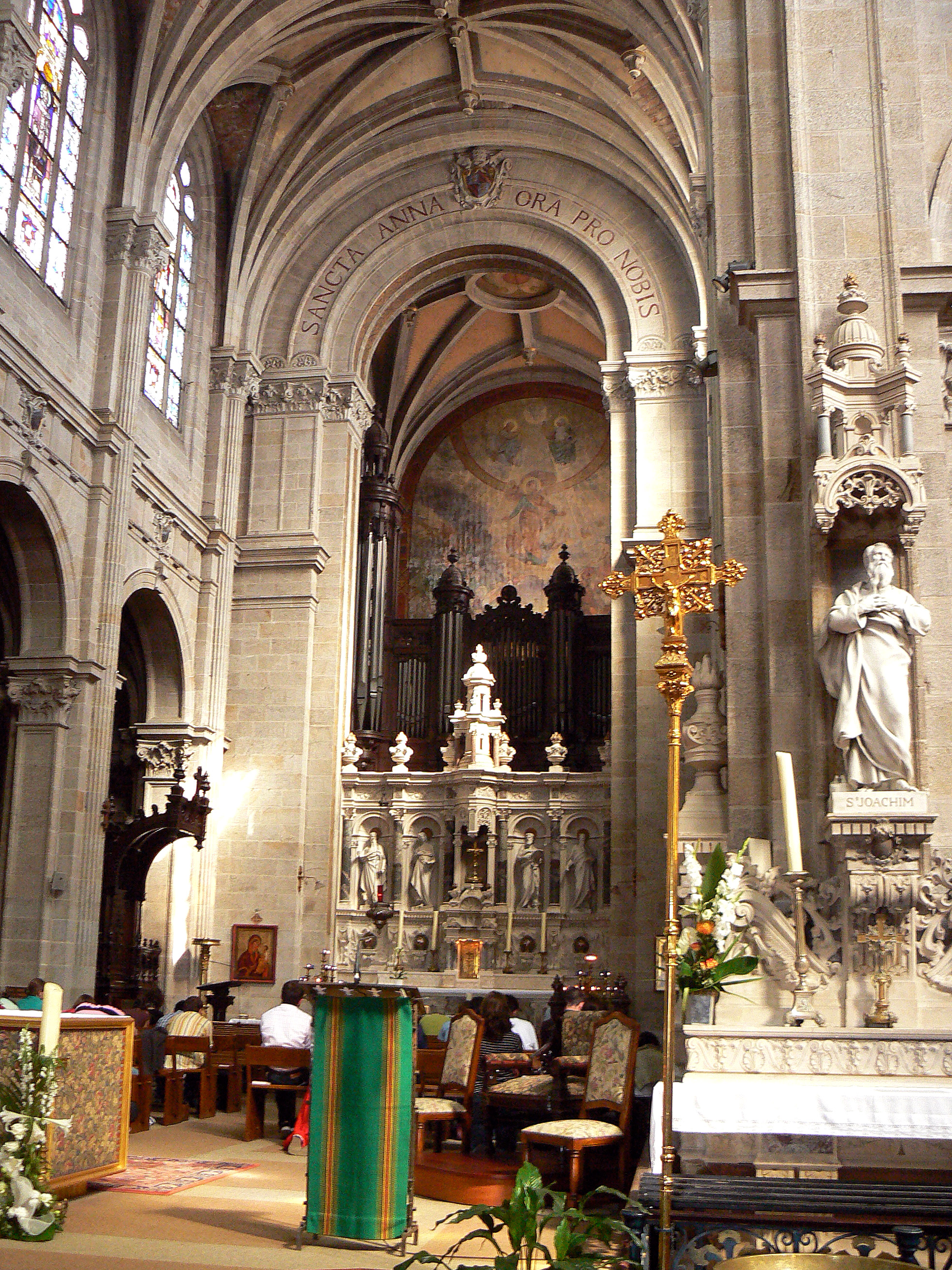 Chœur de la Basilique Sainte-Anne d'Auray et grandes-orgues Cavaillé-Coll (56).